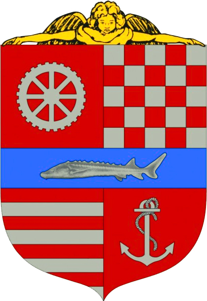 Coat Budapest 13 district